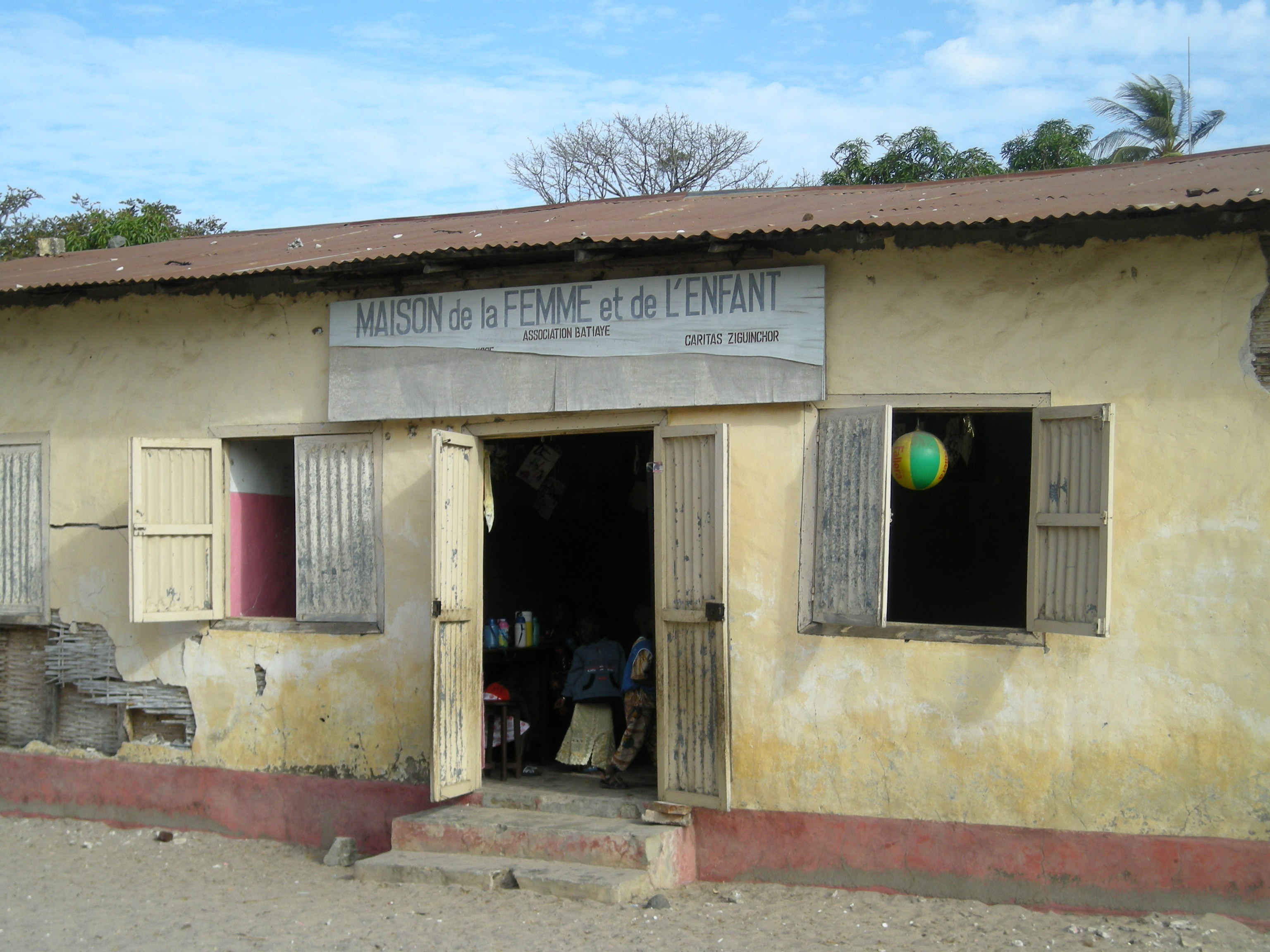 Maison de la femme et de l'enfant à Carabane (Casamance, Sénégal) : école maternelle